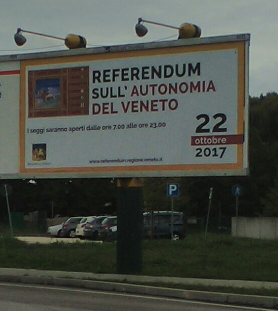 Manifesto referendum regionale per l'autonomia del Veneto 2017